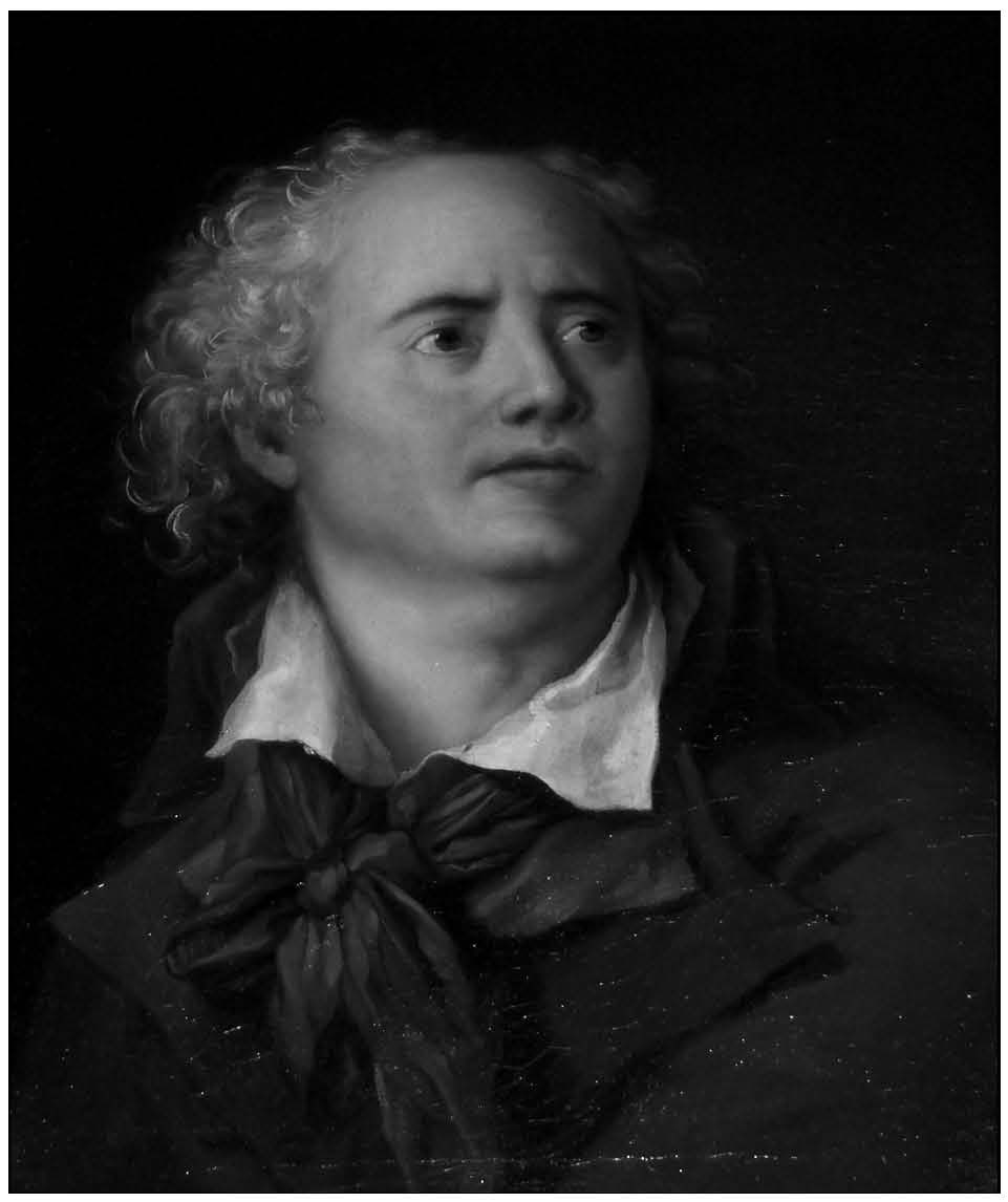 René Delaville-Leroulx (1749-1797)